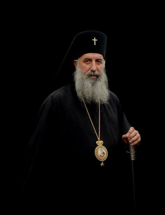 მეუფე გერასიმე - ზუგდიდისა და ცაიშის ეპარქიის ეპისკოპოსი, საქართველოს კათოლიკოს–პატრიარქის ქორეპისკოპოსი